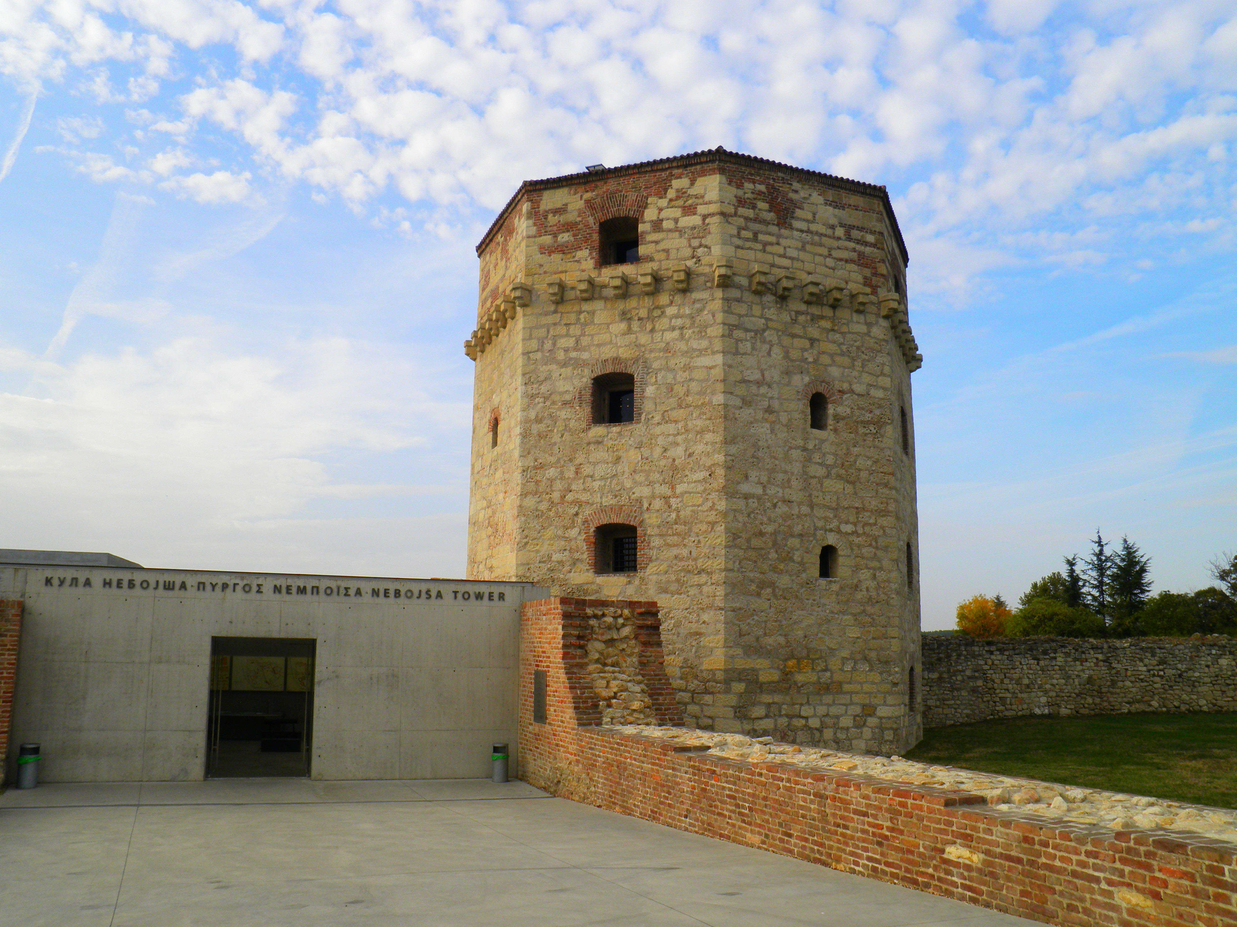 Kula Nebojša